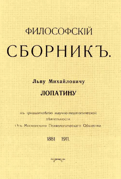 Философский сборник к 30-летию научной деятельности русского философа Льва Михайловича Лопатина